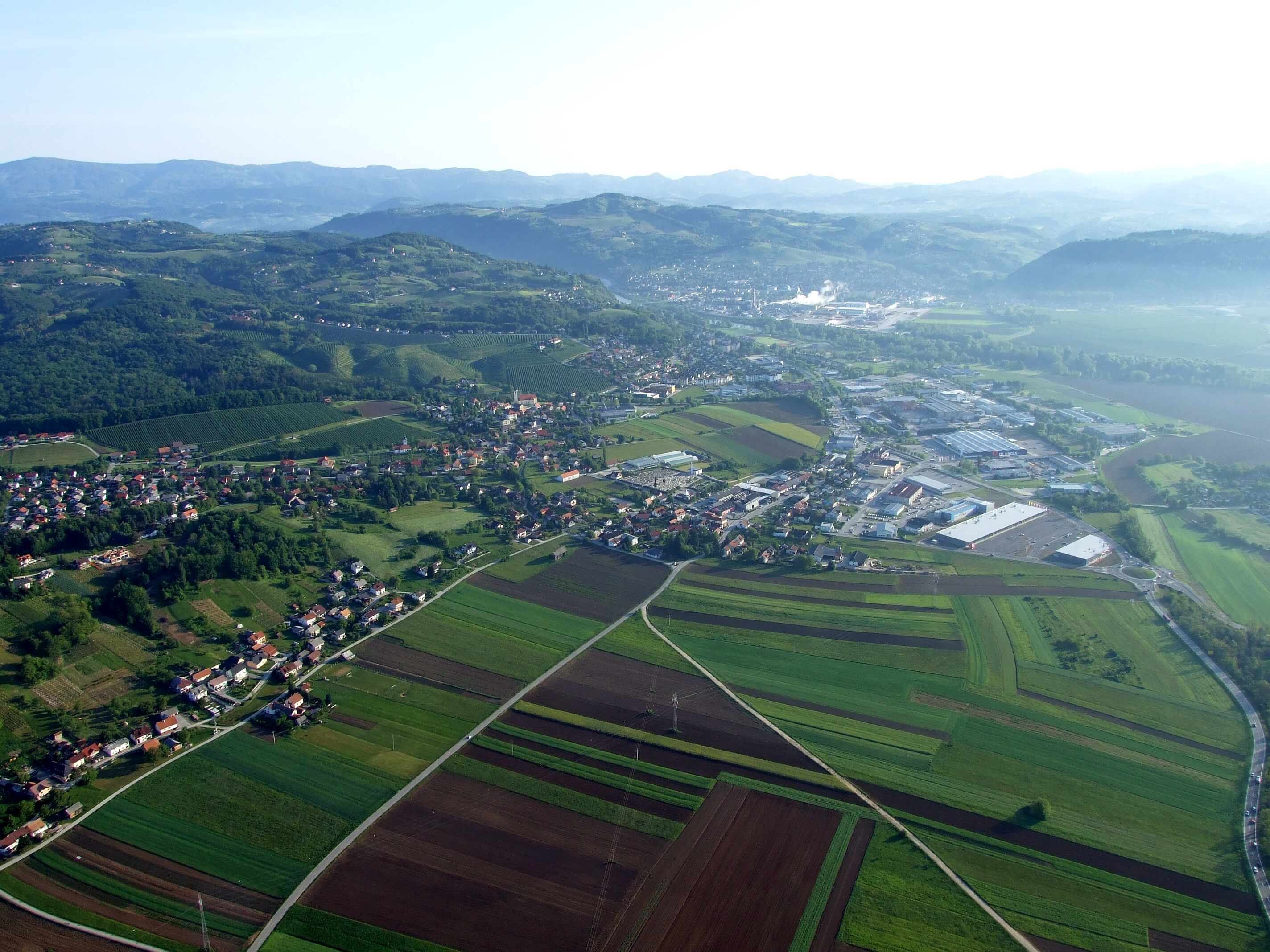 skoraj 400 metrov visine